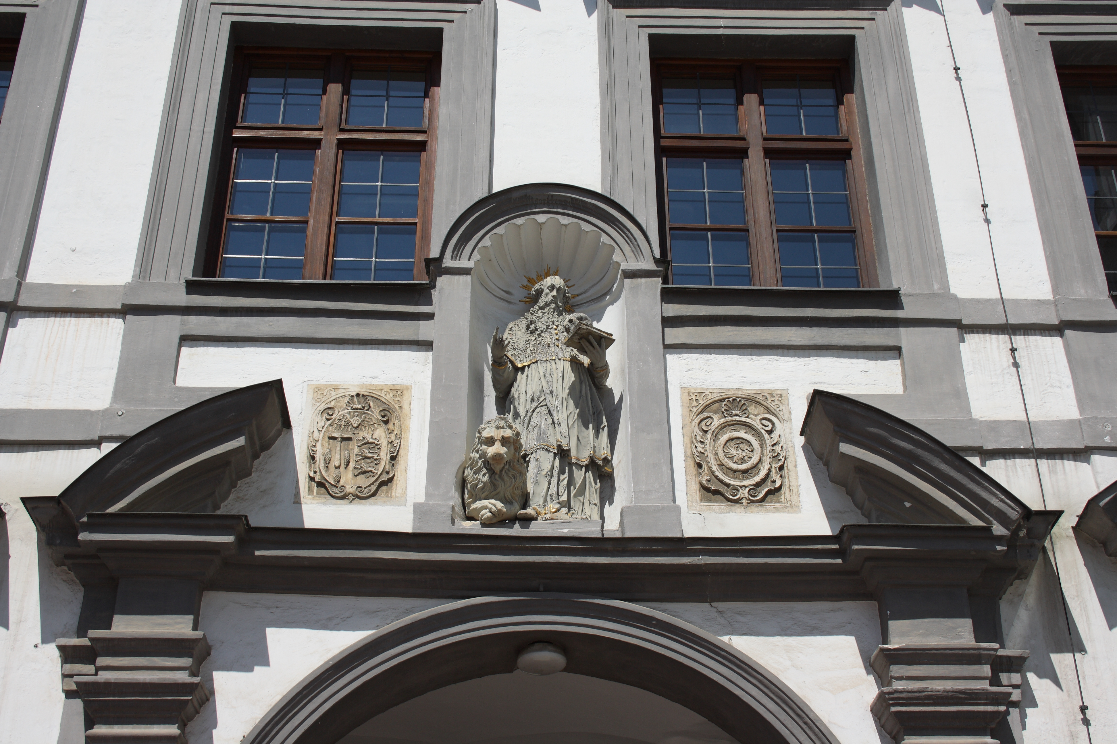 Altes Tor der Universität, heute Akademie für Lehrerfortbildung und Personalführung, in der Kardinal-von-Waldburg-Straße 7 in Dillingen an der Donau (Bayern), Holzskulptur des hl. Hieronymus von 1625, links Wappen der ehemaligen Universität Dillingen, rechts Wappen des Augsburger Fürstbischofs Heinrich von Knöringen